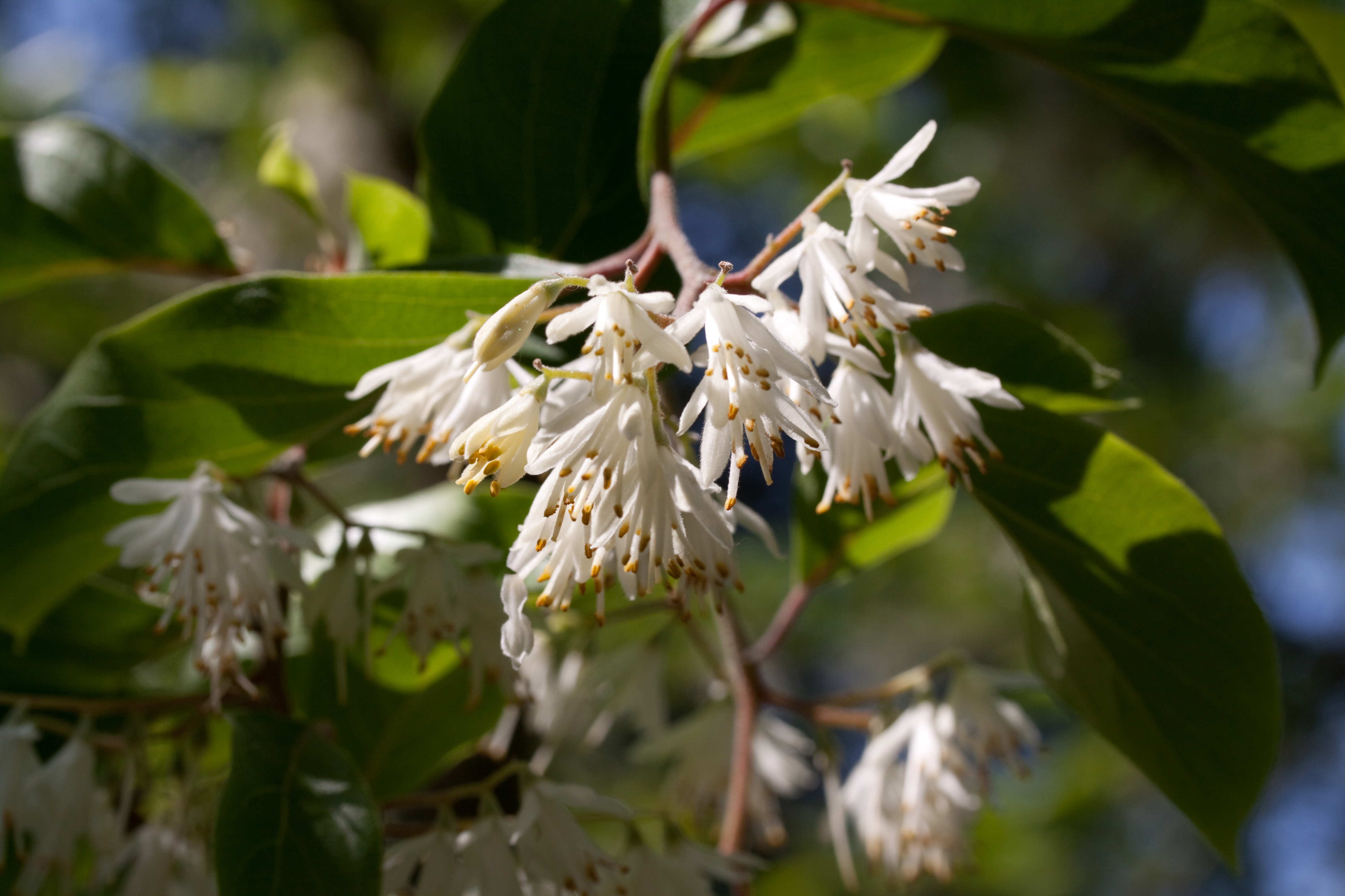 Fleurs de Pterostyrax corymbosus - Jardin botanique de Strasbourg - France